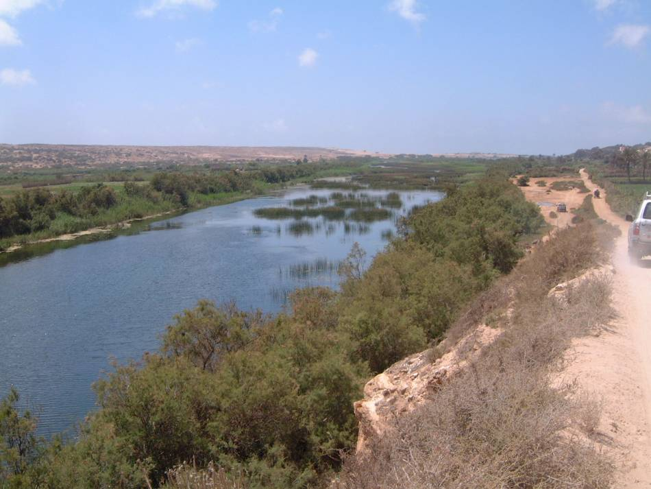 Jardin le long de l-oued Massa au Maroc